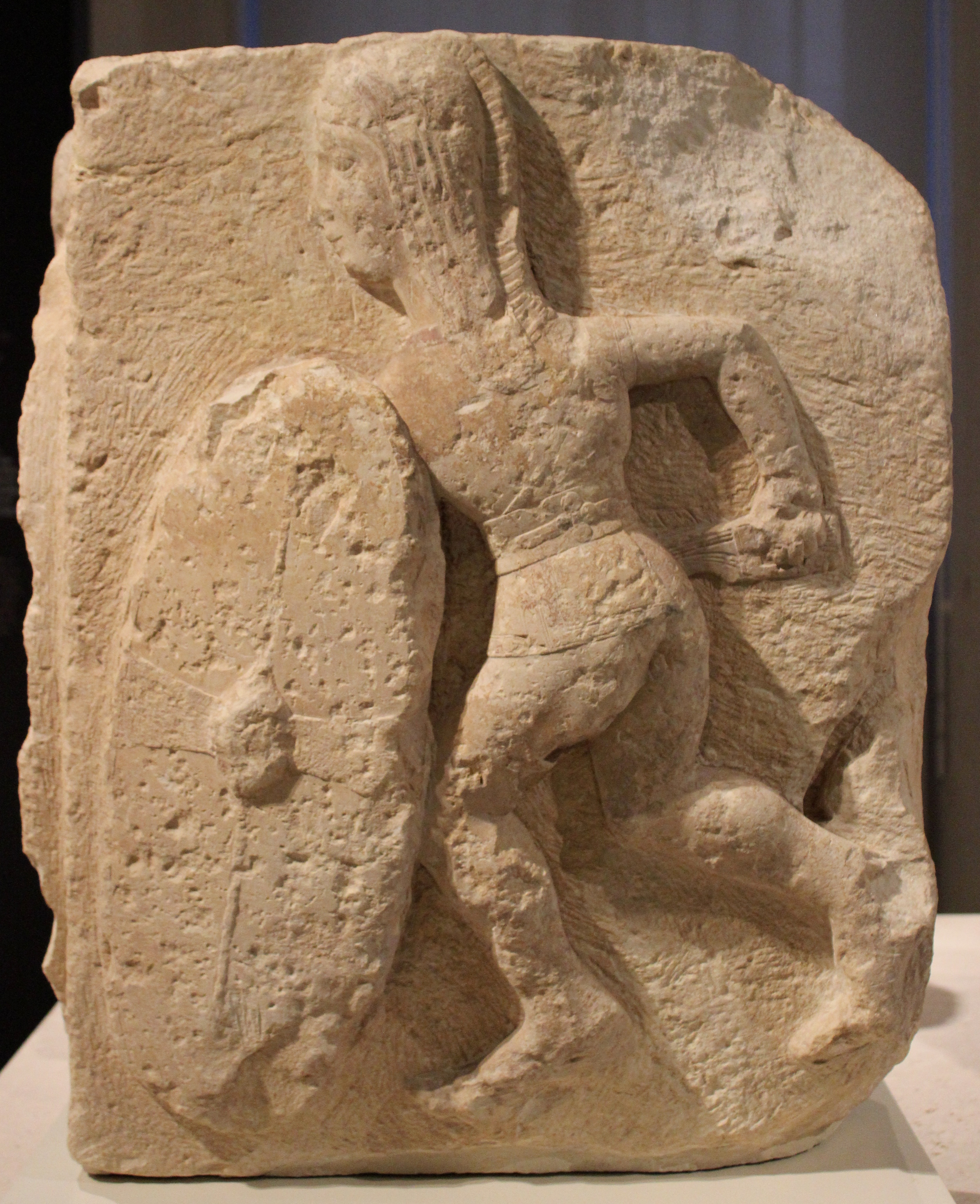 Relieves del monumento A de Osuna